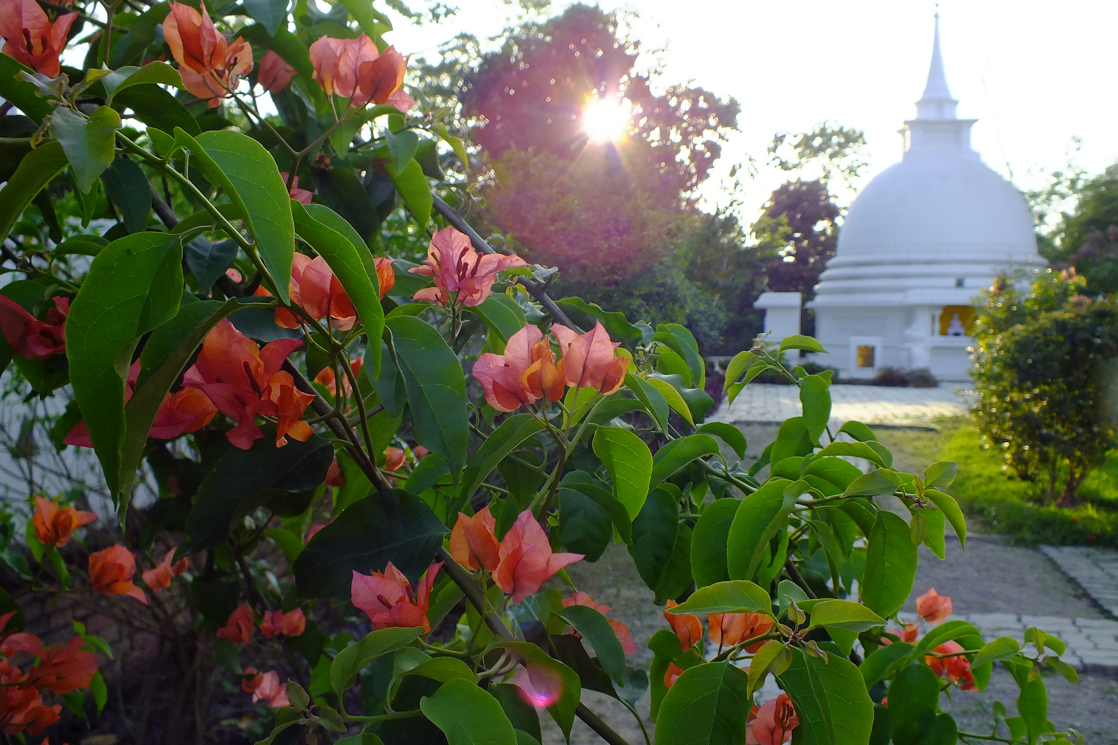 2015-03-16 Lumbini（Sri Lanka temple）ルンビニ・スリランカ寺